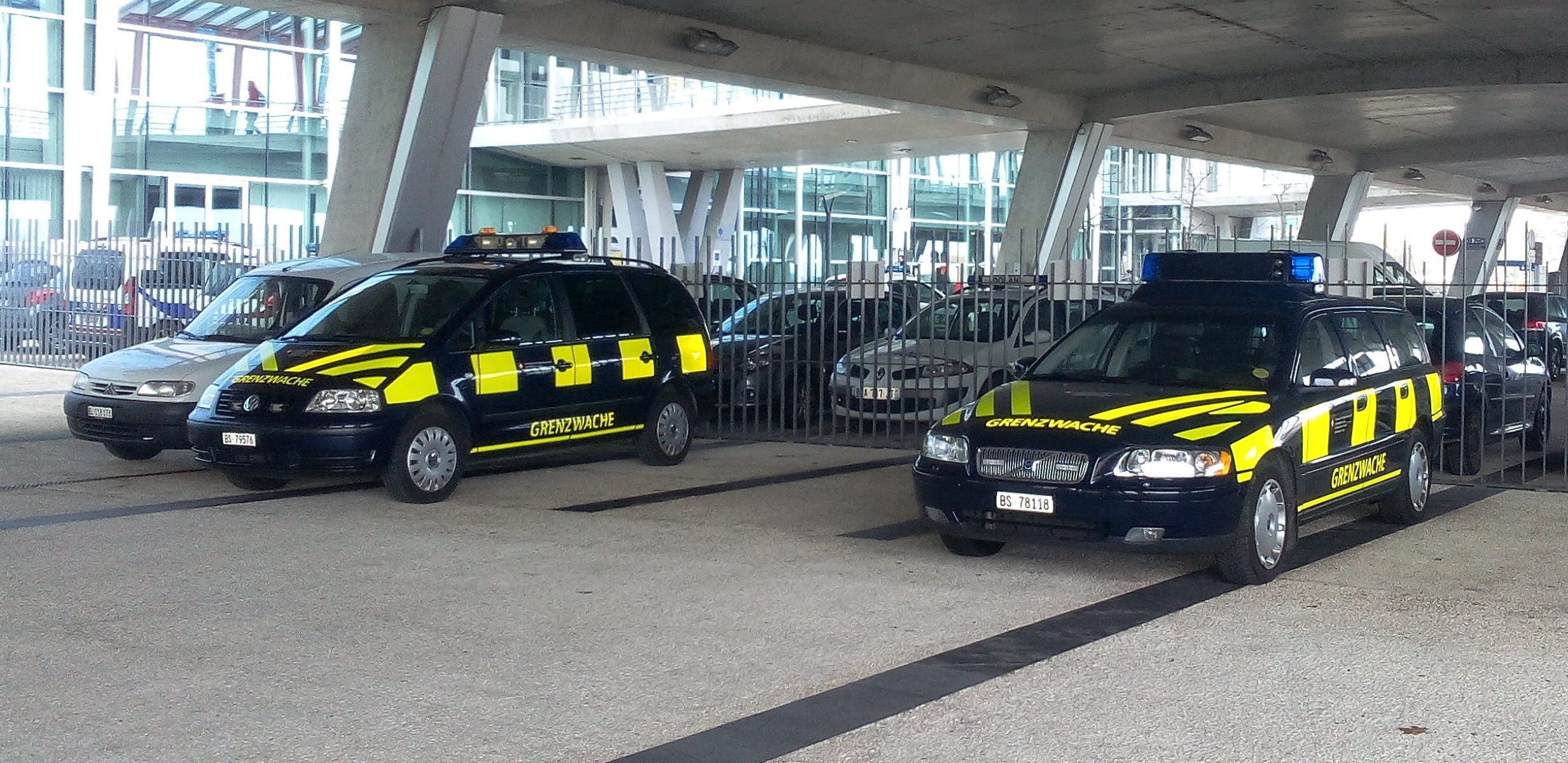 Véhicules des garde-frontières Suisses